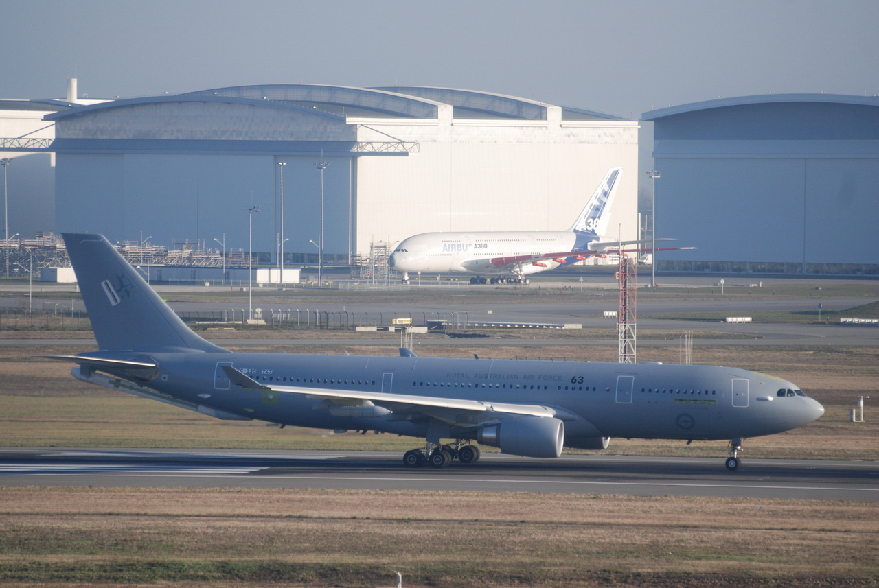 Photo prise à l'aéroport de Toulouse-Blagnac (LFBO) en France. Picture take at Toulouse-Blagnac Airport (LFBO) in France.